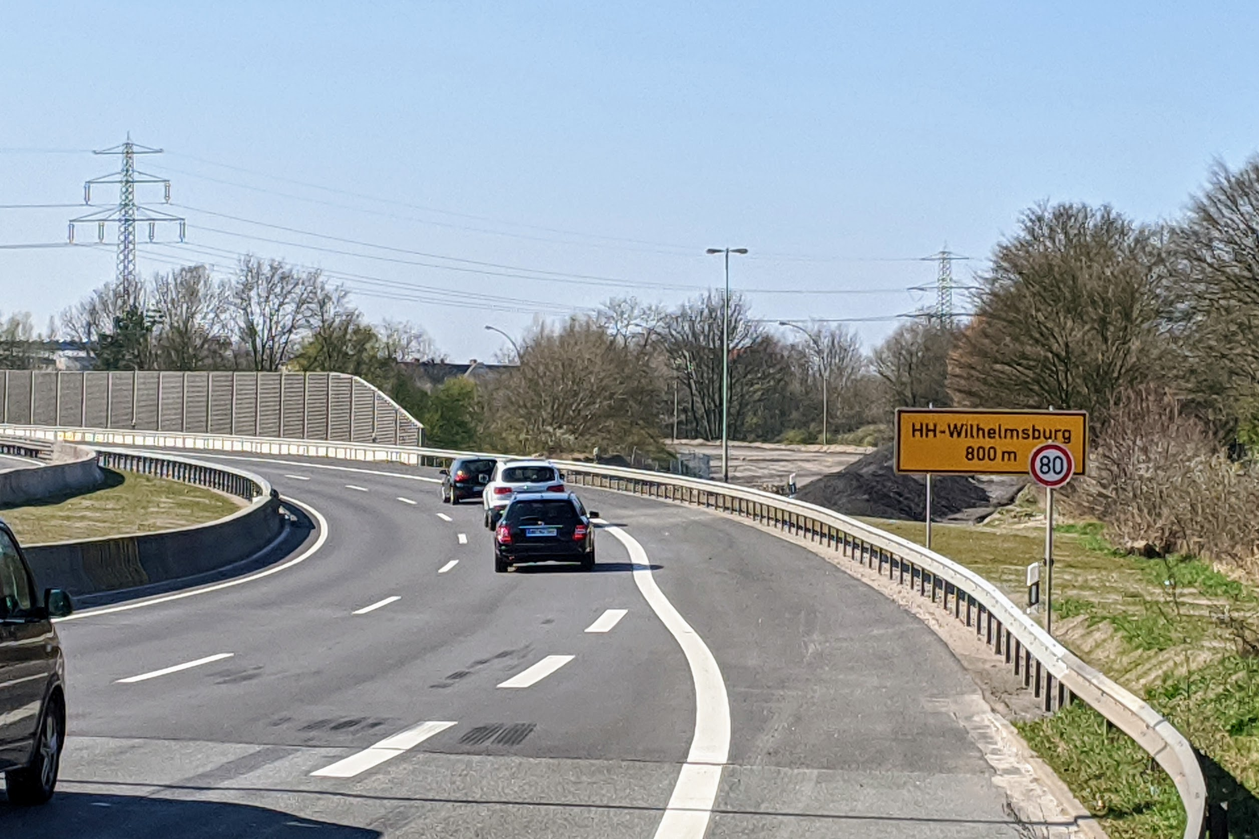 Wilhelmsburger Reichsstraße, nördliche Ausfädelung der Neutrasse, im Hintergrund die alte Trasse